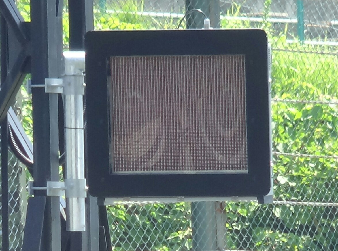 鈴鹿サーキット ホームストレートのライトパネル（表側）